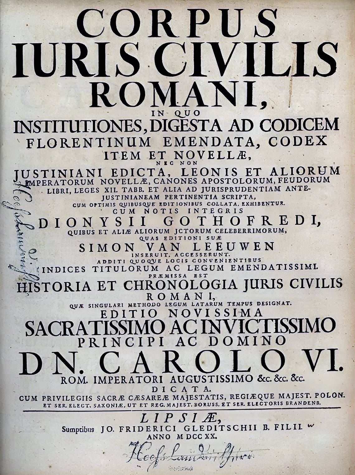 Јустинијанов зборник (Corpus Iuris Civilis) - Насловна страна Готофредусовог издања из 1583. године.